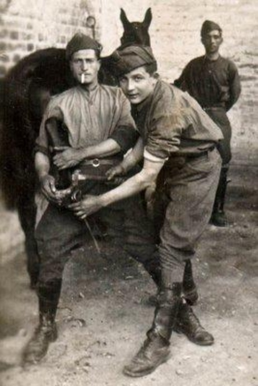 Maniscalchi del Centro di Allevamento Quadrupedi di Portovecchio (Mirandola)